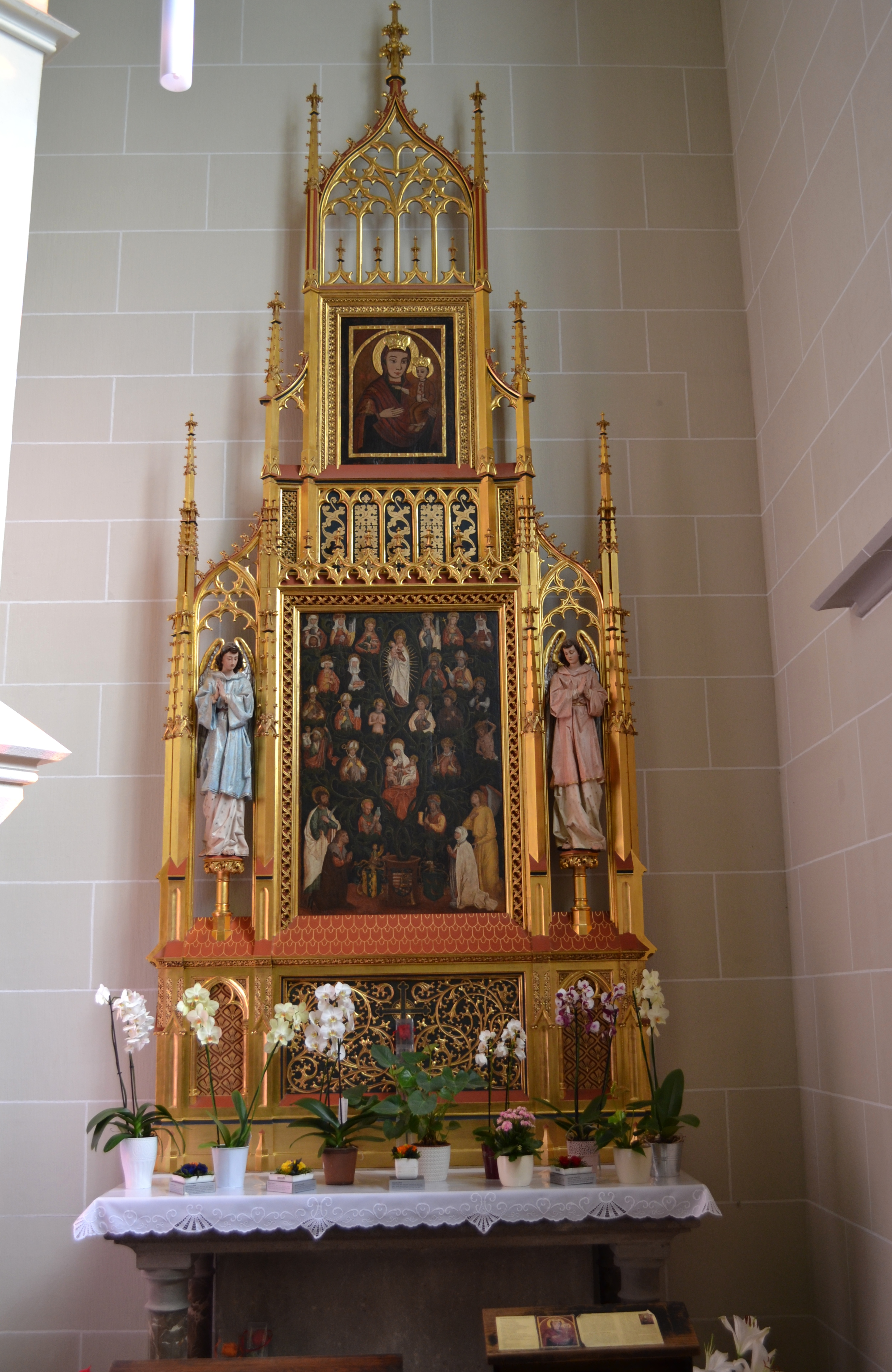 Oltár Mettercie v Dóme sv. Alžbety. Vzácna maľba pochádzajúca z roku 1516, znázorňuje svätú Annu Samotretiu a rodokmeň starozákonného Izaiáša.